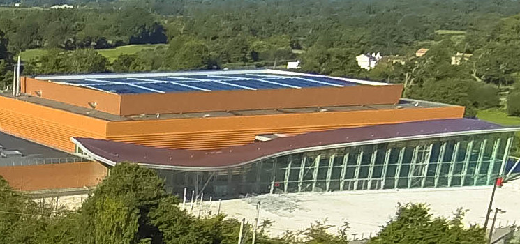 Photo prise par drone du parc hôtelier de la zone Beaupuy avec le Vendéspace en fond.